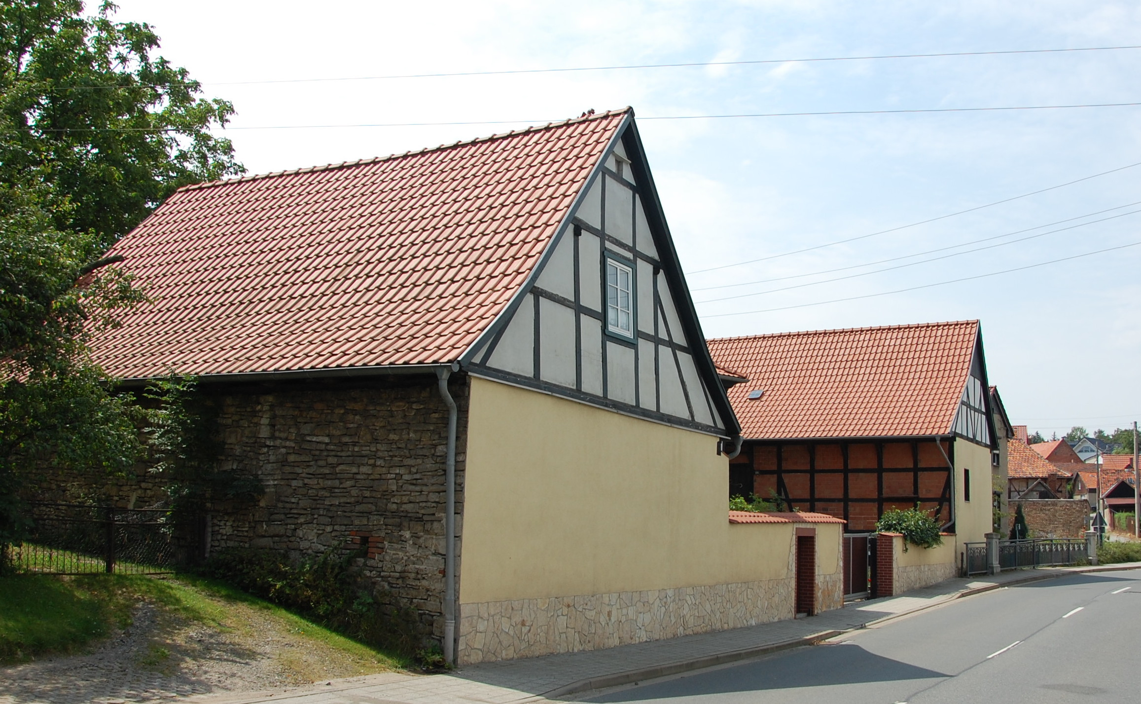 Haus Chausseestraße 1 in Bad Suderode